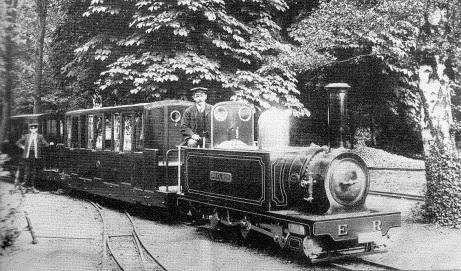 Shelagh, an 0-6-0T of the Eaton Hall Railway in 1904, built at Sir A.P. Heywood’s workshops at Duffield Bank